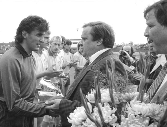 ADN-ZB-Gahlbeck 8-8-87-ba-Leipzig: Fußball-Oberliga- 1. Spieltag- Vor der Begegnung 1. FC Lok Leipzig gegen Wismut Aue wurde Lok-Torhüter Renè Müller als "Fußballer des Jahres" ausgezeichnet. Er nahm den "´Silbernen Fußballschuh" aus den Händen von Jürgen Nöldner, Chefredakteur der "Fußballwoche", entgegen."